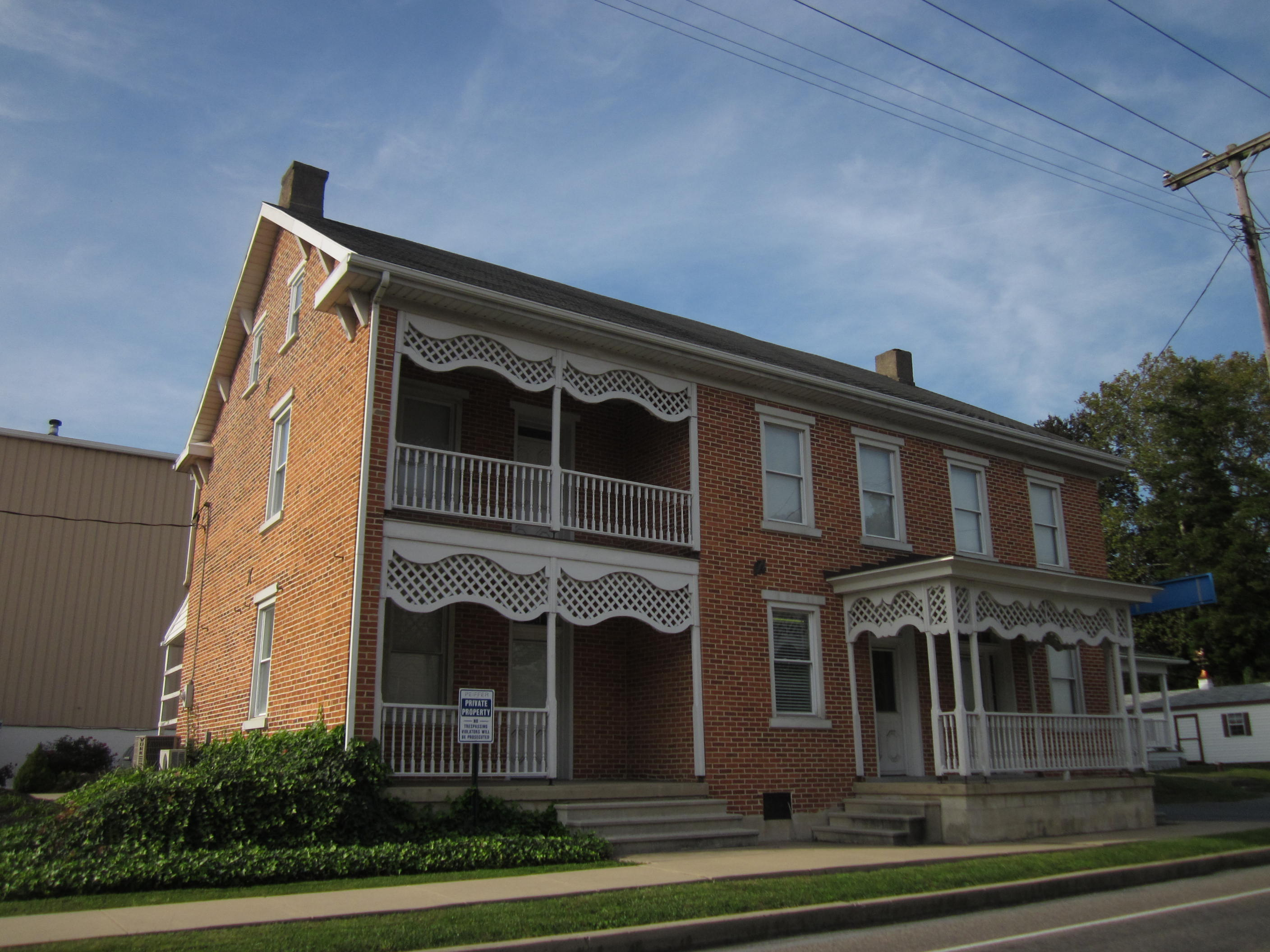 Mount Aetna, Pennsylvania